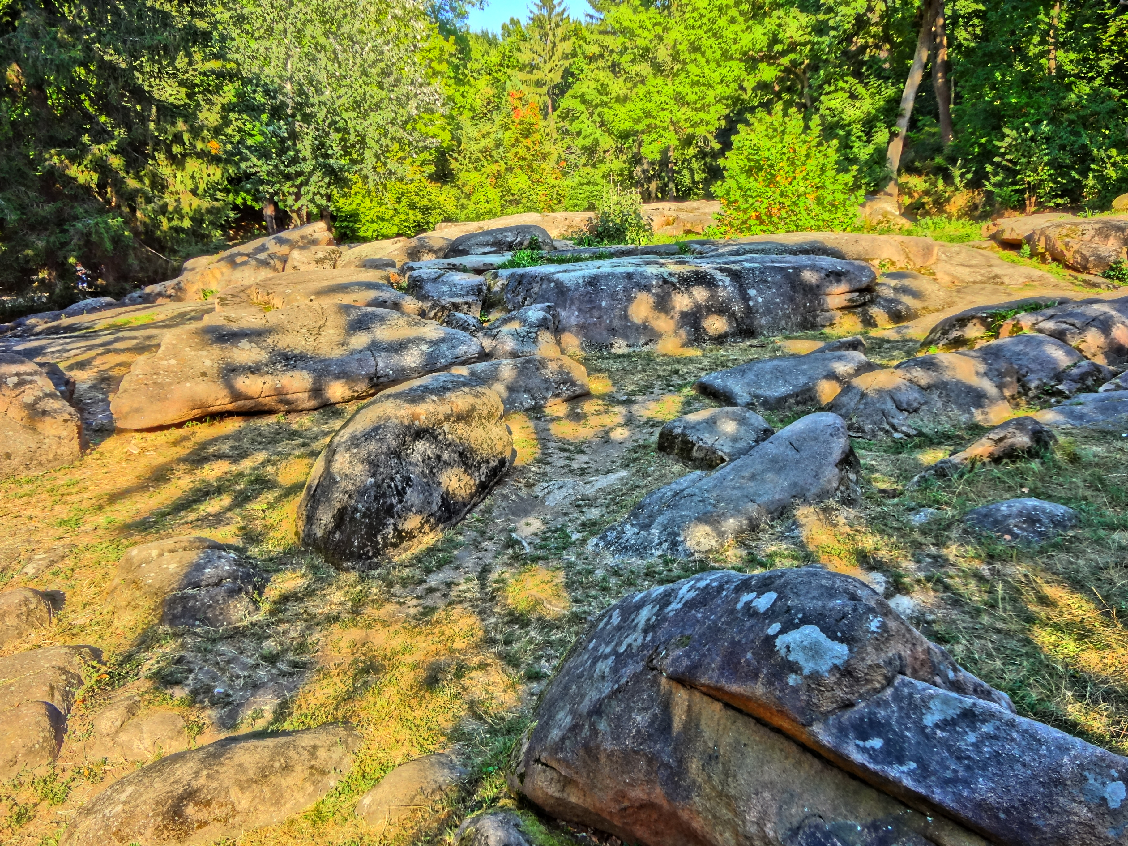 4.17. Крітський лабіринт (мур.), Умань, вул. Садова, 55 (парк «Софіївка»)